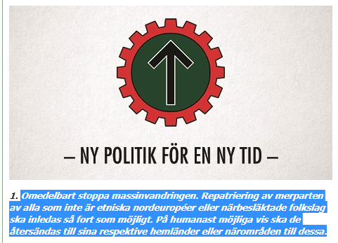 Σκανδιναβική νεοναζιστική οργάνωση Κίνημα Νορδική Αντίσταση: 'Να σταματήσει αμέσως η μαζική μετανάστευση. Επαναπατρισμός των περισσότερων μεταναστών, που δεν είναι εθνικά Βορειοευρωπαίοι ή δεν έχουν συγγενική καταγωγή, πρέπει να ξεκινήσει το συντομότερο. Με τον πιο ανθρώπινο τρόπο, πρέπει να επιστρέψουν στη χώρα προέλευσής τους ή σε γειτονικές περιοχές της.'